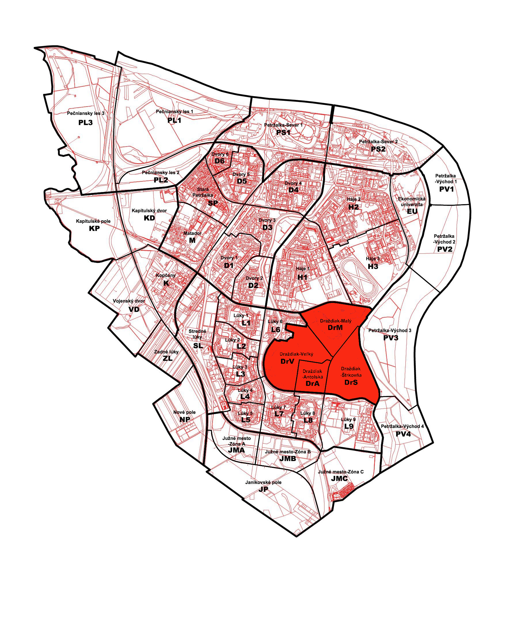 Poloha miestnej časti Petržalky